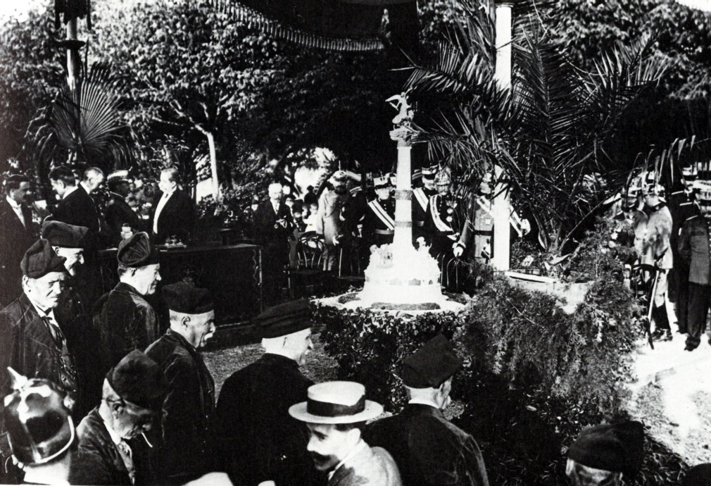 Ceremonia de colocación de la primera piedra de un Monumento a las Glorias de África en la Plaza de Tetuán, Barcelona (1910).